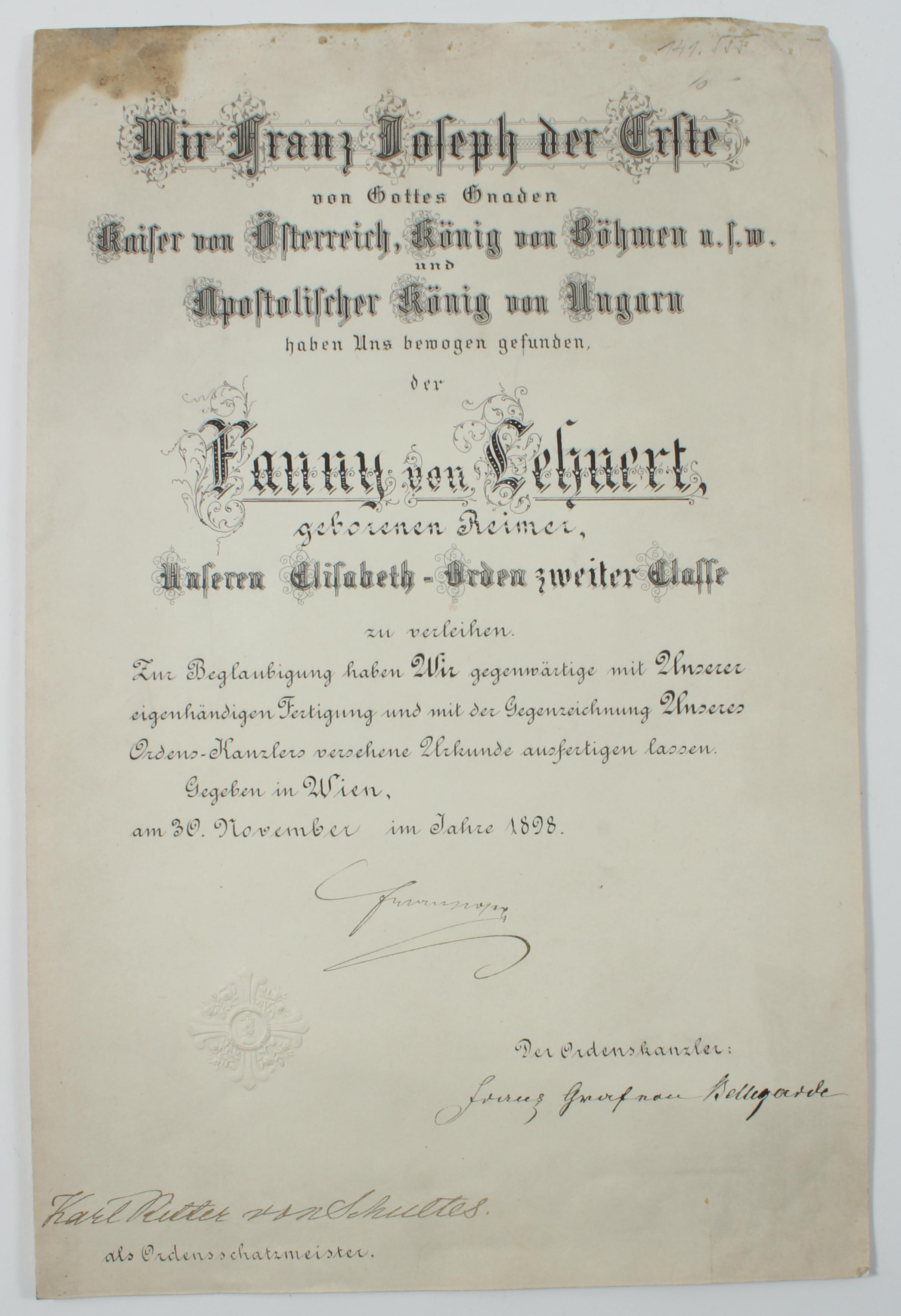 Verleihungsurkunde zum Elisabeth-Orden zweiter Klasse für Fanny von Lehnert, geb. Reimer, (1852–1930), Ehefrau des Konteradmirals Joseph von Lehnert, und Stifterin einer Kunstsammlung an das Museum Carolino-Augusteum Salzburg) Wien, 30. 11. 1898, Formular mit eigenhändiger Unterschrift des Kaisers Franz Joseph I., Gegenzeichnung durch Ordenskanzler Franz Graf Bellegarde und Ordensschatzmeister Karl von Schultes